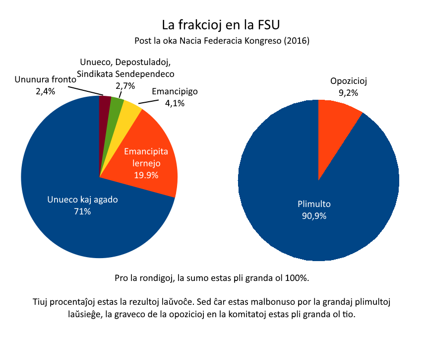 Graveco de la frakcioj de la franca sindikato FSU laŭ la voĉoj ricevitaj de ili en la oka nacia federacia kongreso de Le Mans (2016).